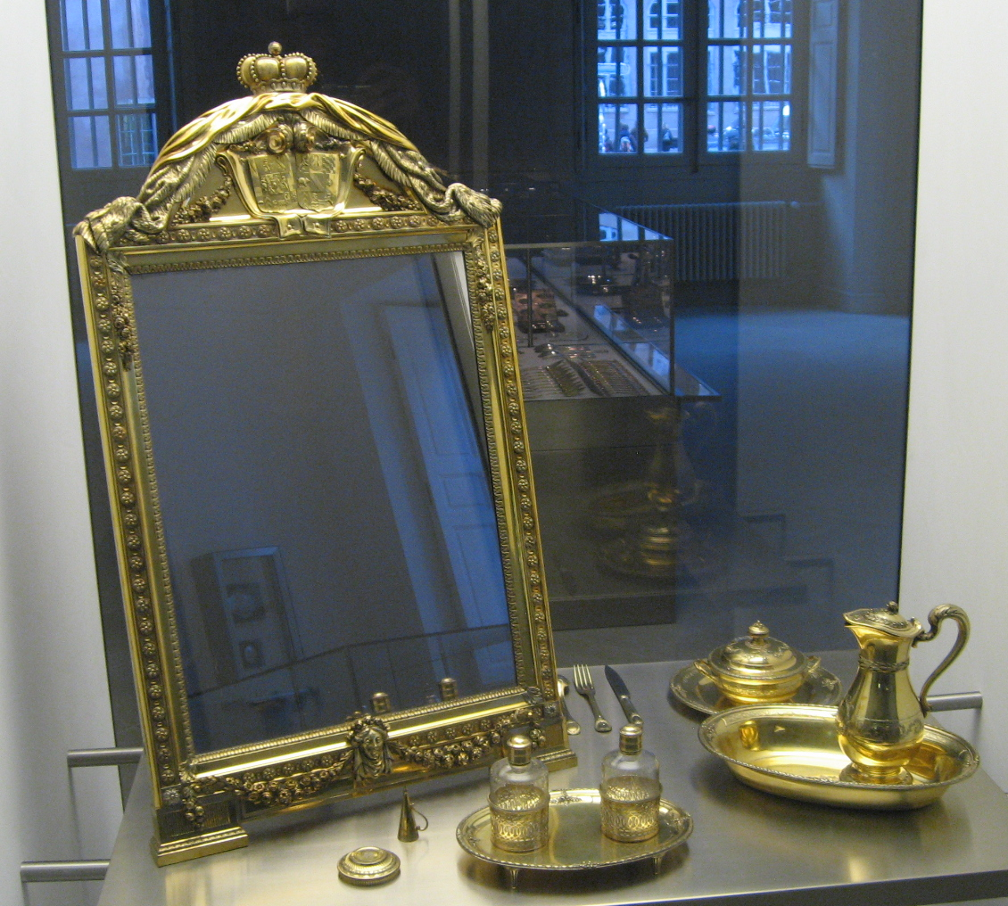 Nécessaire de la Princesse de Deux-Ponts Miroir de toilette Johann Jacob Kirstein (1733-1816, maître en 1760) 1786 Argent doré, glace au mercure et noyer H. 96,5 cm ; l. 56,6 cm ; P. 7,2 cm. Le miroir fait partie du nécessaire offert par Maximilien Joseph de Deux-Ponts, colonel-propriétaire du régiment d’Alsace à Strasbourg, à Augusta Wilhelmine de Hesse-Darmstadt (1765-1796), fille du comte Georges Guillaume de Hesse-Darmstadt et de Marie Albertine Louise de Linange-Heidesheim, à l’occasion de la naissance de leur fils ainé. Das Schloss Heidesheim bei Obrigheim (Pfalz) des gräflichen Hauses Leiningen-Heidesheim wurde 1794 durch Truppen der Französischen Revolution niedergebrannt.